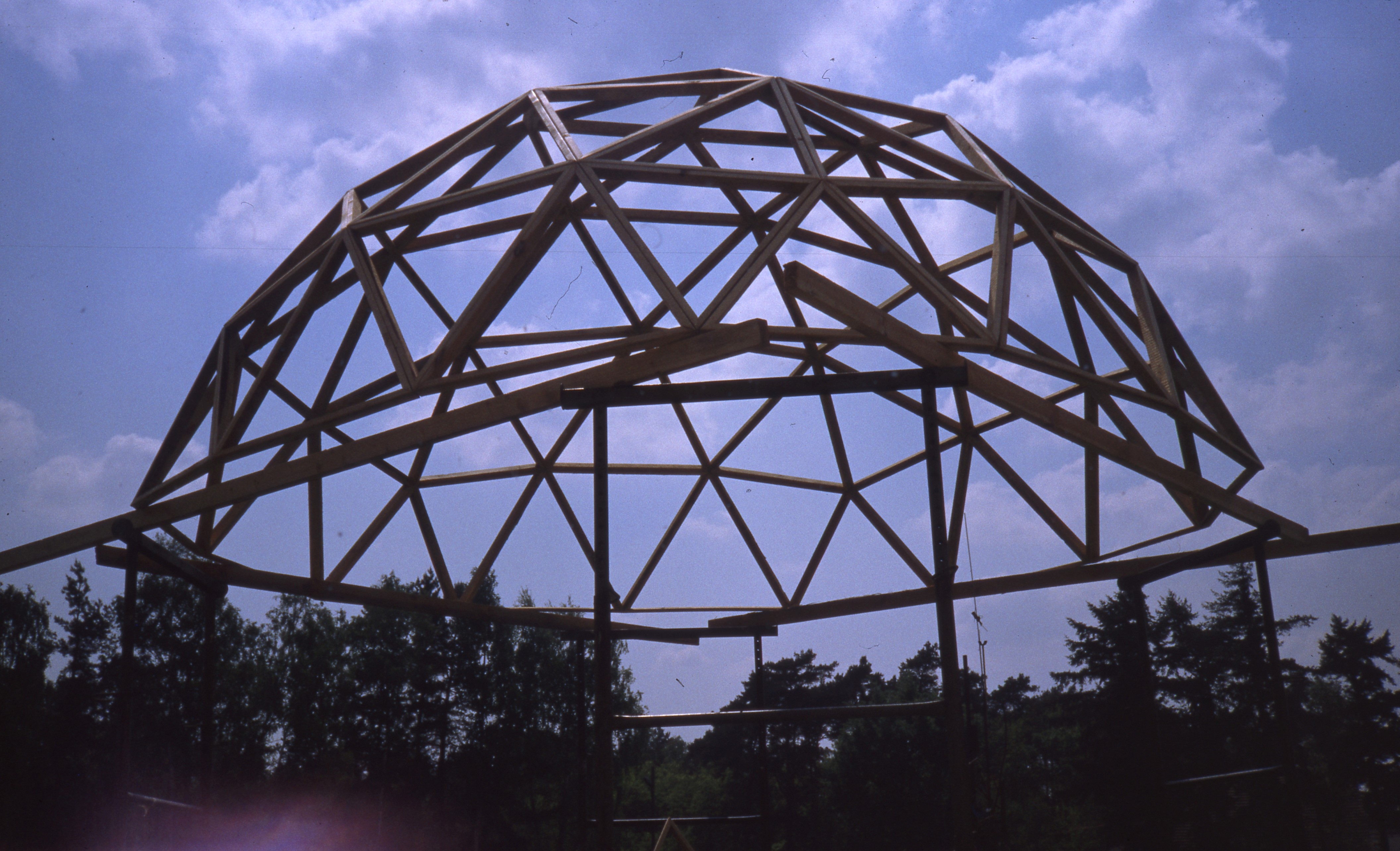 BioarchitekturGeodätische Kuppel von Rudolf Dörnach